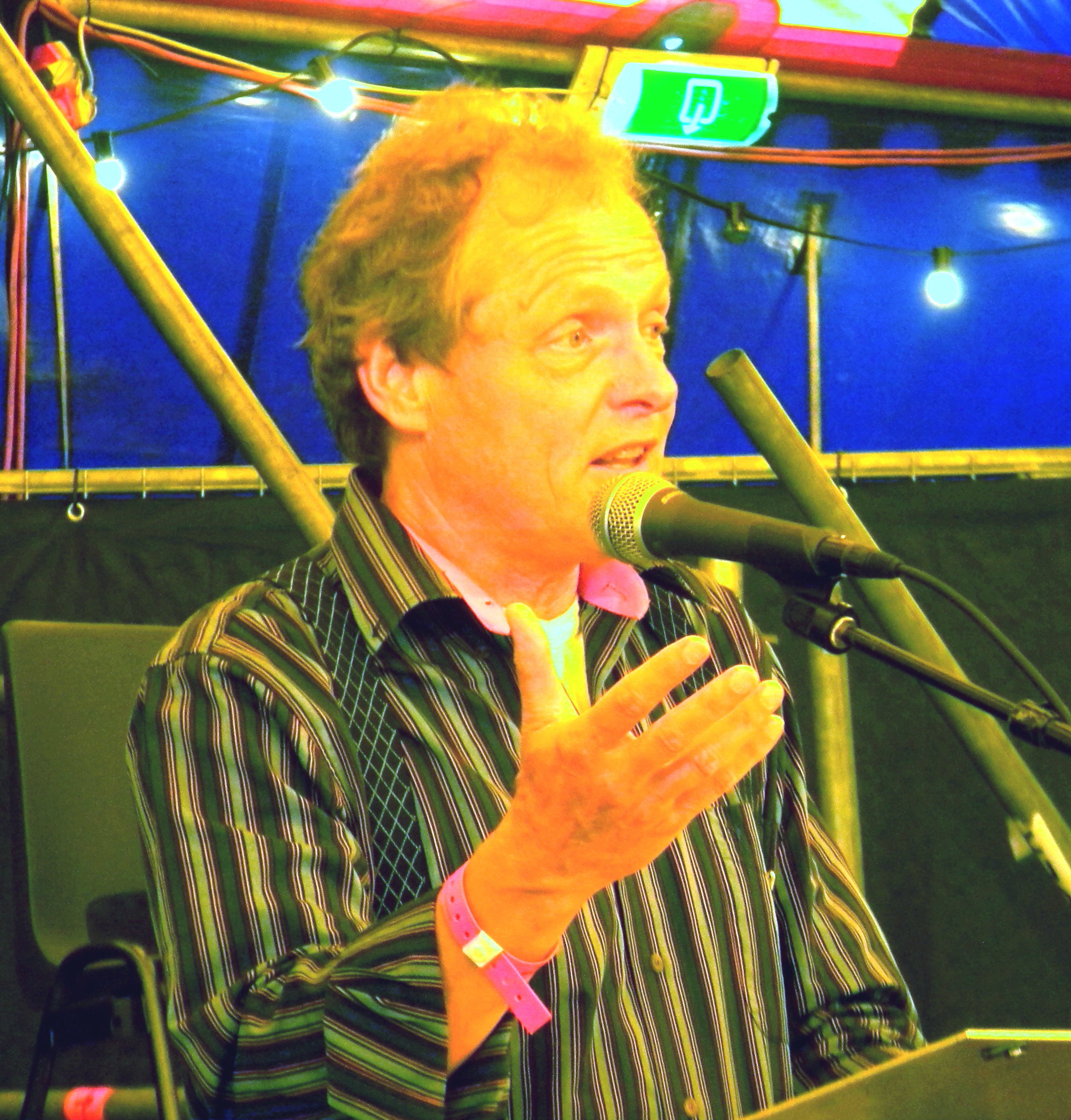 Jean-Jacques Suurmond tijdens een spreekbeurt op het Flevo Festival op 20 augustus 2010.